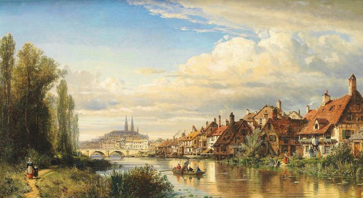 Blick über die Donau auf Regensburg, datiert 1876, signiert, Öl auf Leinwand, 59 x 101 cm